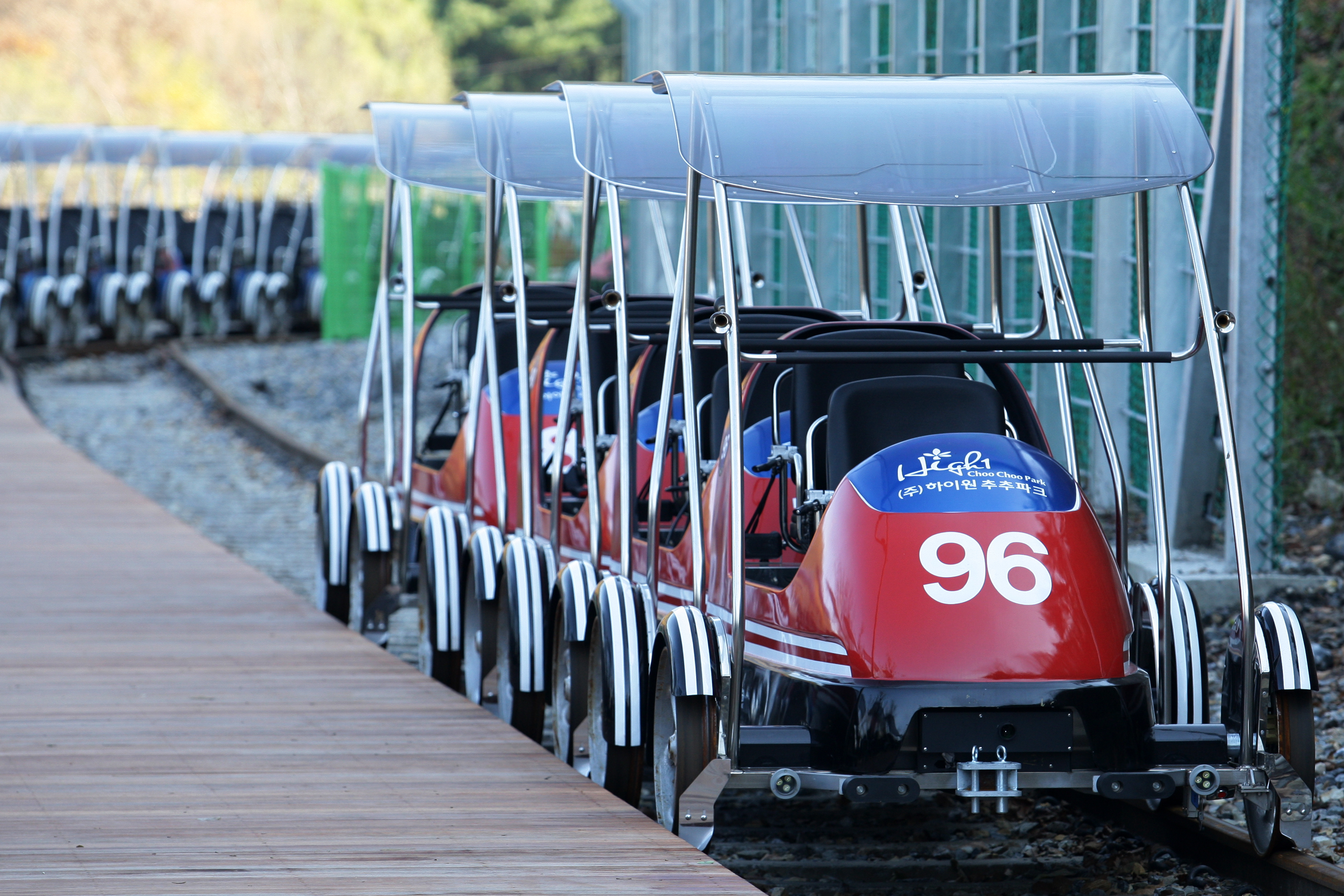 레일바이크